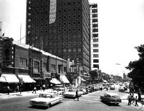 ساختمان پلاسکو در دهه ۱۳۴۰ شمسی - تهران